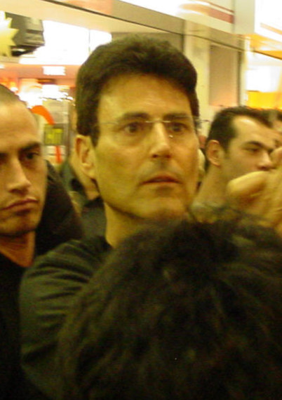 Uri Geller beim Löffelbiegen